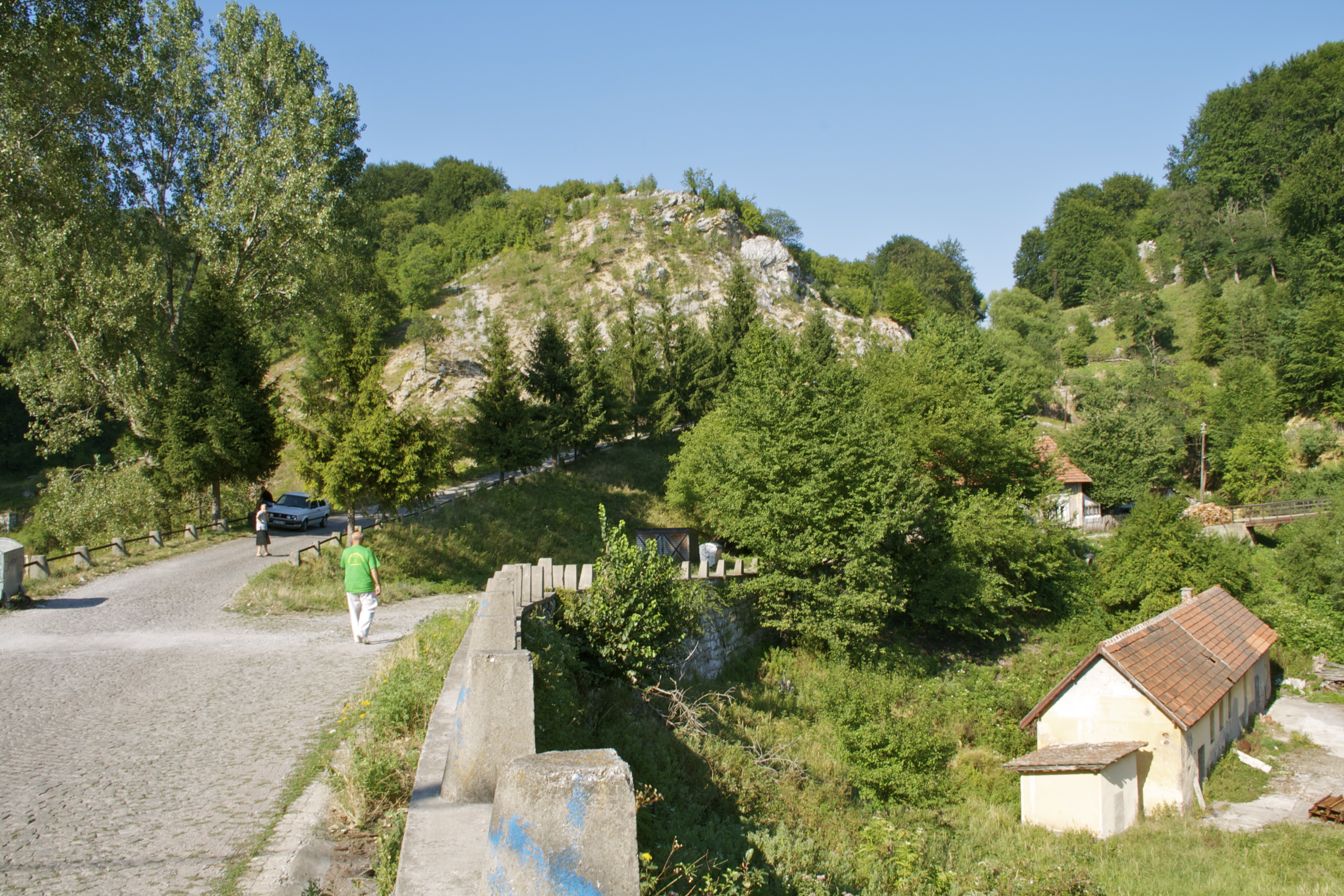 Сењски рудник на регионалном путу Р-103